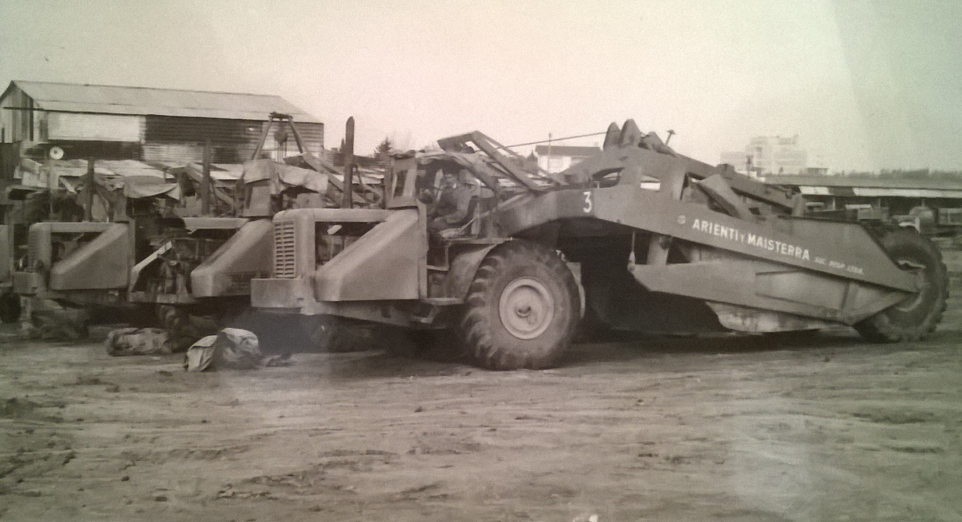 Maquinarias de construcción viales de Arienti y Maisterra. A fines de la década del 40'.